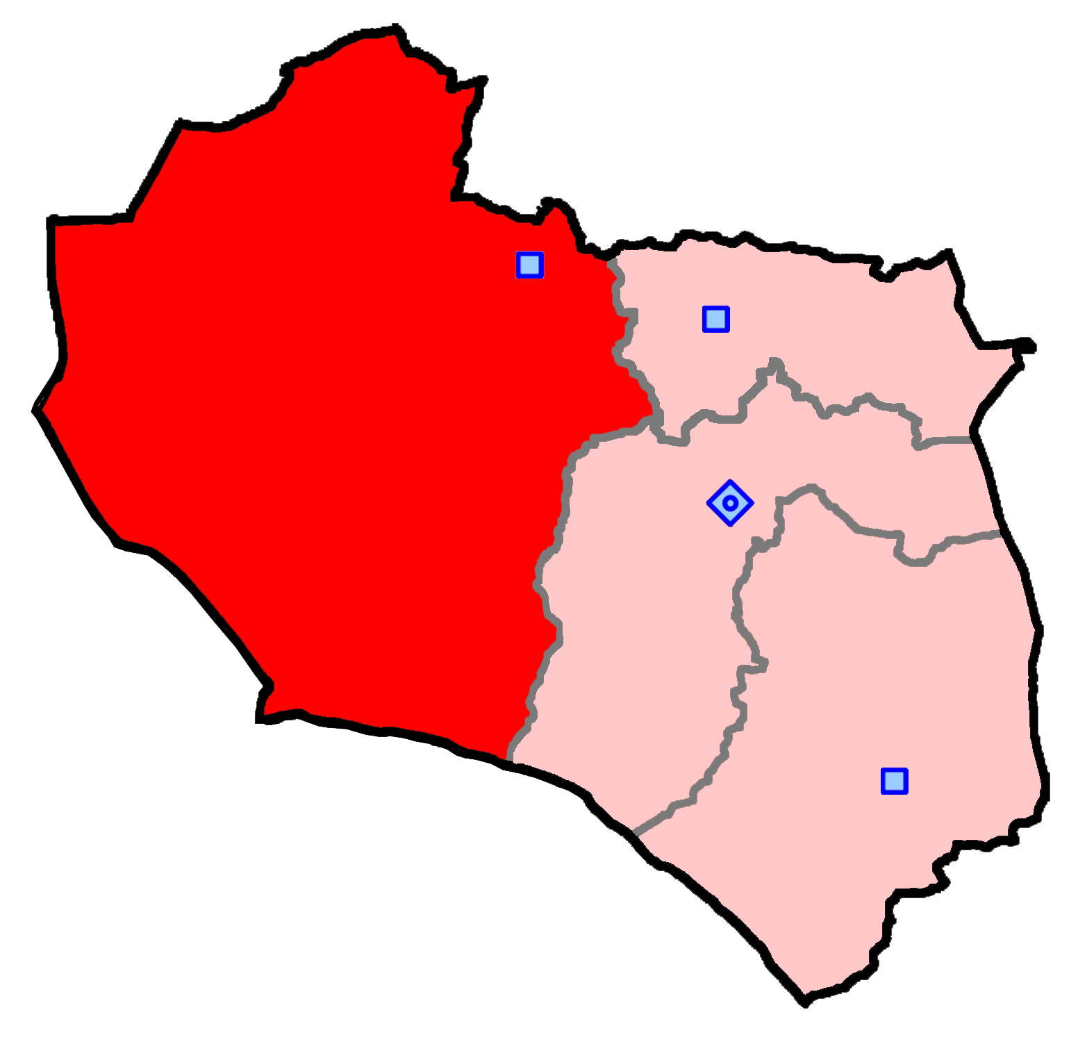 حوزهٔ انتخاباتی فردوس و سرایان و طبس و بشرویه برای انتخابات مجلس شورای اسلامی